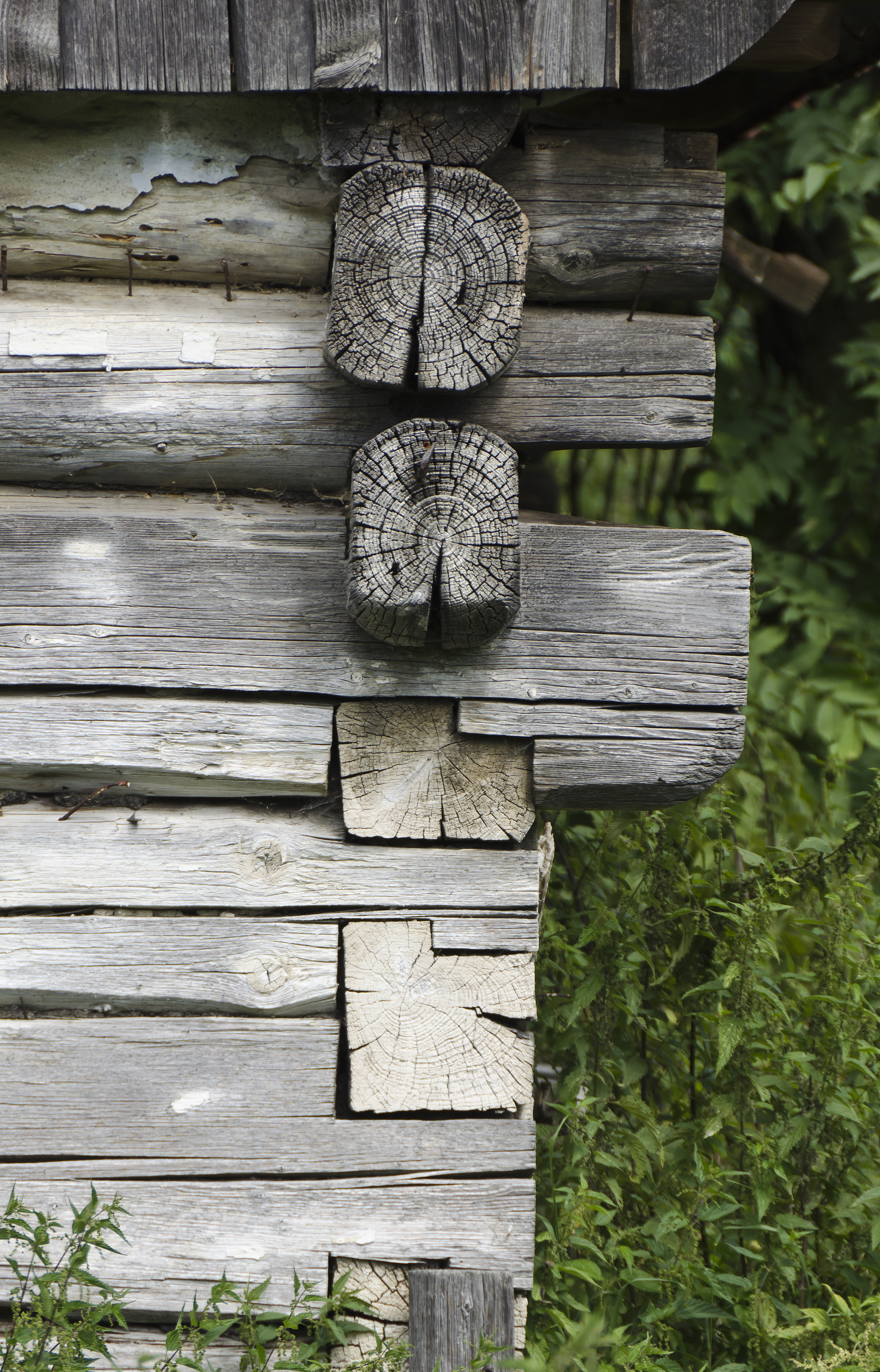 Stary Waliszów, dom nr 67, pocz. XIX